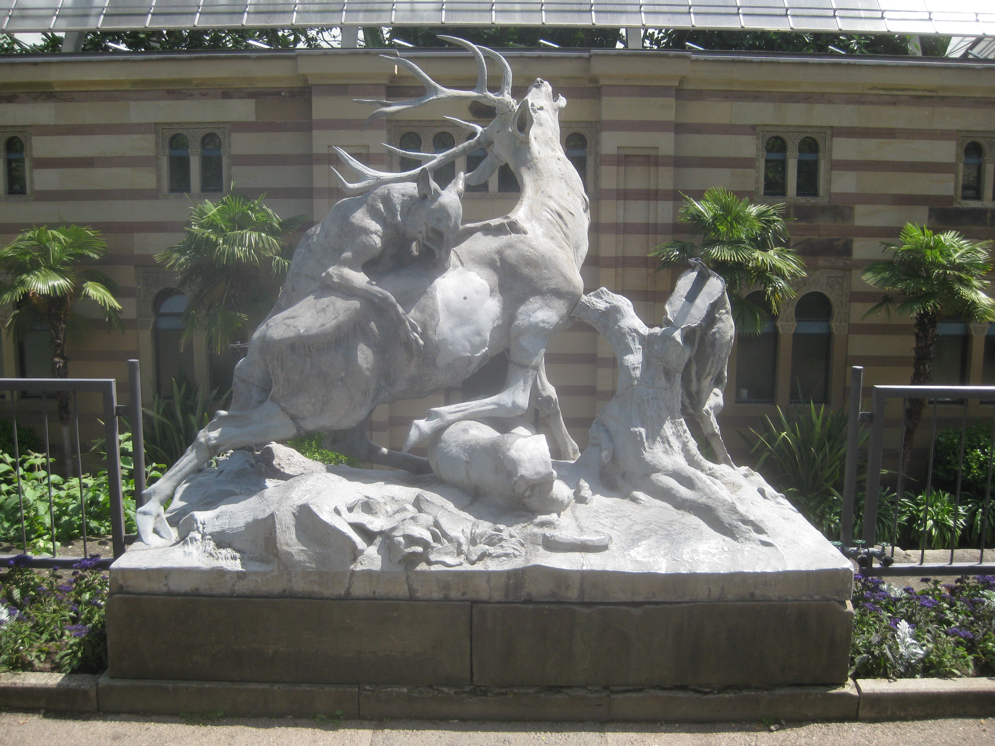 Albert Güldenstein / Guss: Wilhelm Pelargus: Hirsch von Wölfen angefallen (Rückseite), Zinkguss, beschädigt, Entstehungsjahr 1852, Stuttgart, Wilhelma, mitten auf der ersten Stützmauer der Terrassenanlage hinter dem Maurischen Landhaus.